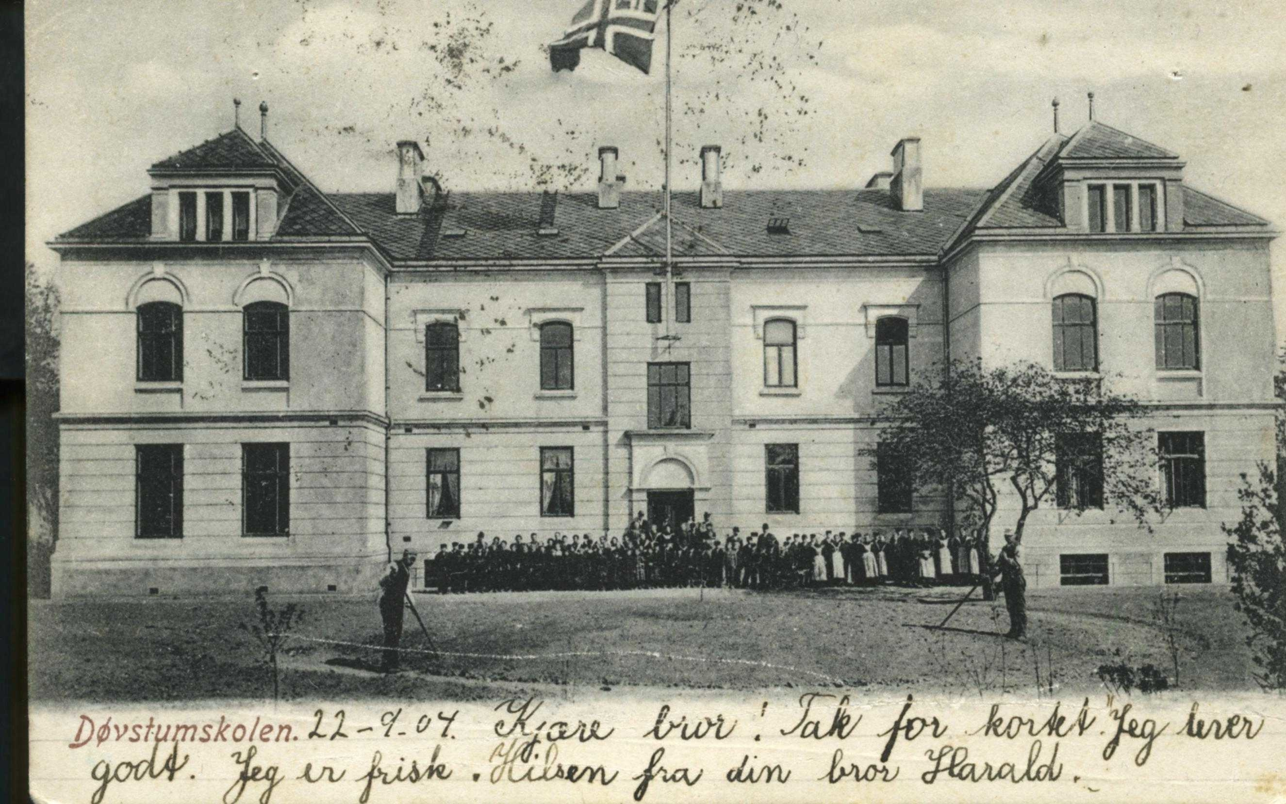 Internatbygningen til Døveskolen, Bispegata 9 B, Trondheim (ca 1900 - påskriften er 1904), Bygningen er i dag revet. Døveskolens internatbygning ble oppført 1897, arkitekt Claus Hjelte